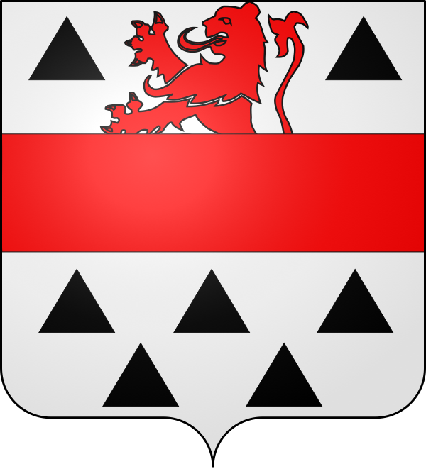 D'argent à la fasce de gueules accompagnée en chef d'un lion issant du même accosté de deux triangles de sable, en pointe de cinq triangles du même posés 3 et 2.